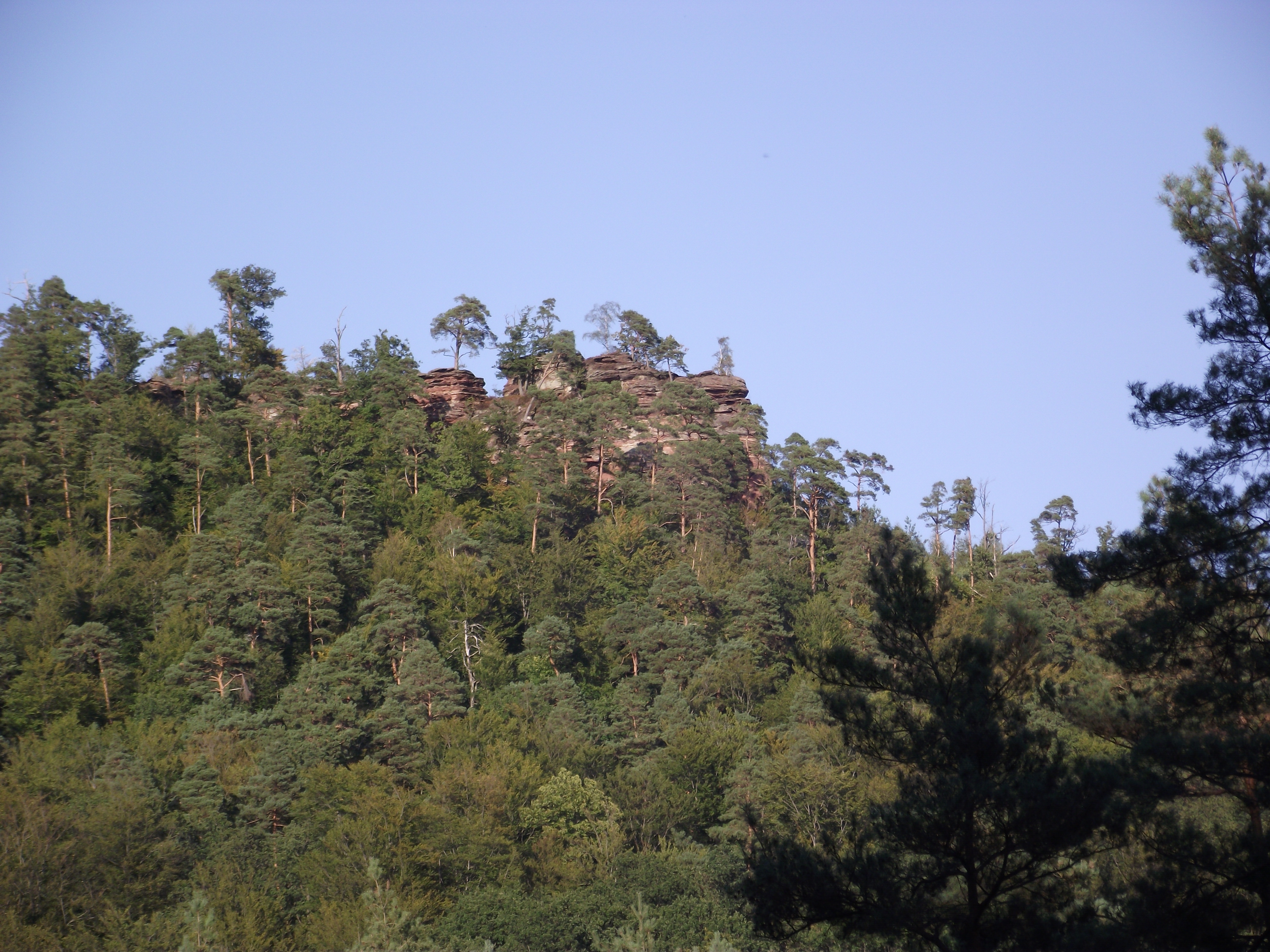 Rochers de grès près du château de Fleckenstein (Vosges du nord)(rochers de Krappenfels)